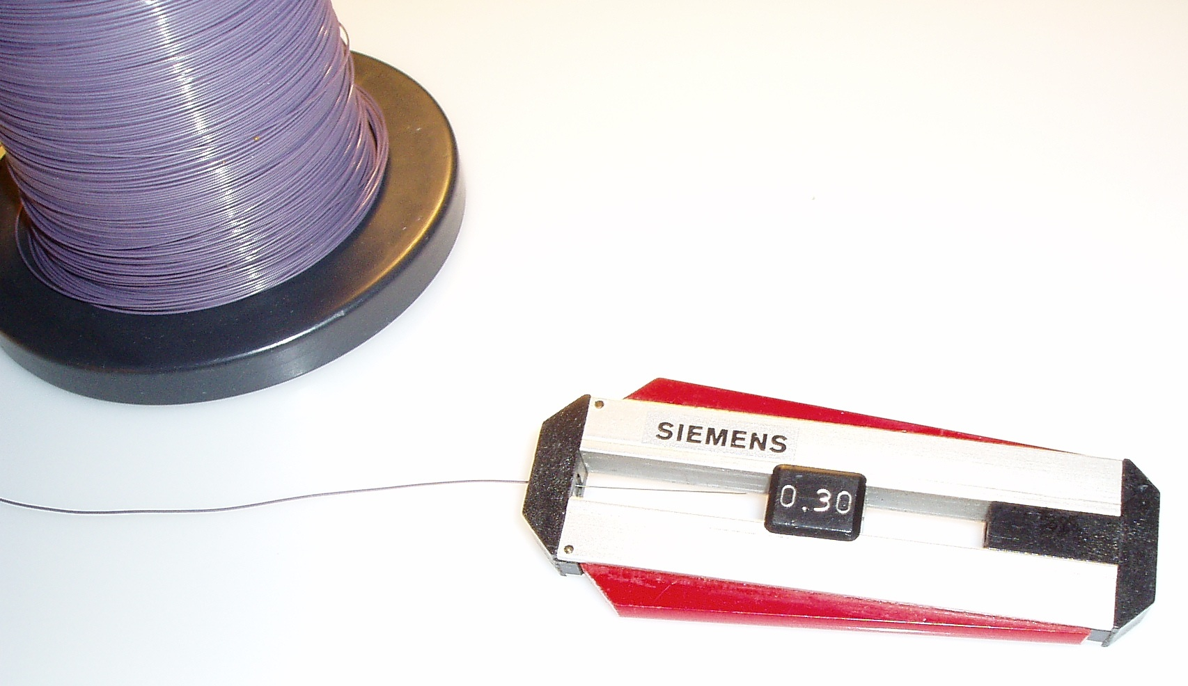 Abisolierwerkzeug für Wire-wrap-Draht der Größe AWG 30 (ca. 1977) Wire stripper for AWG 30 Wire-wrap wires